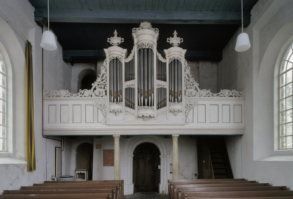 Nederlands Hervormde Kerk: Interieur, aanzicht orgel, orgelnummer 353 (opmerking: Gefotografeerd voor Het Historische Orgel in Nederland 1865-1872)